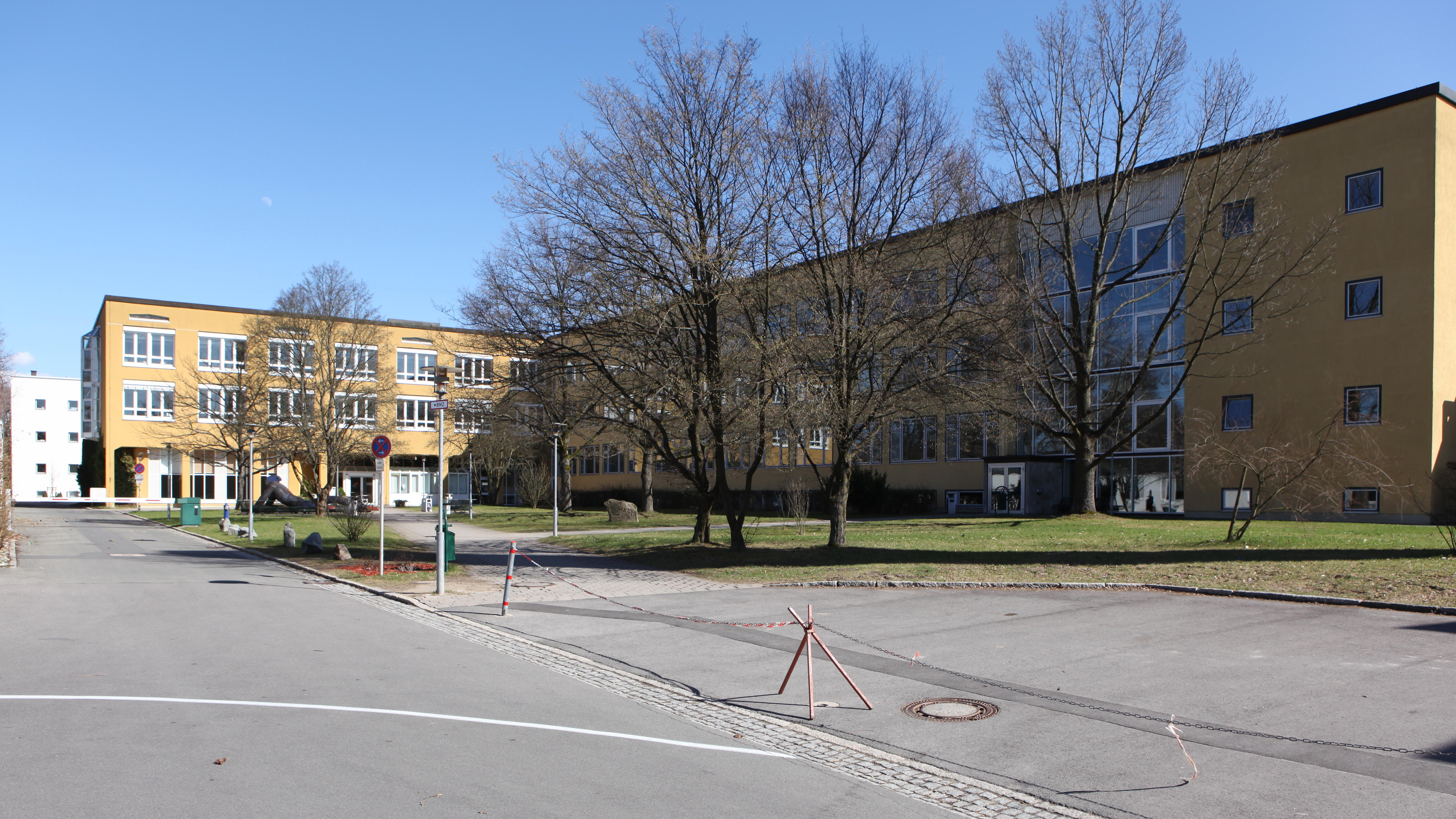 Hochschule Coburg, Campus "Friedrich-Streib-Straße"